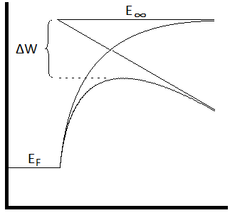 Verringerte Austrittsarbeit durch den Schottky-Effekt